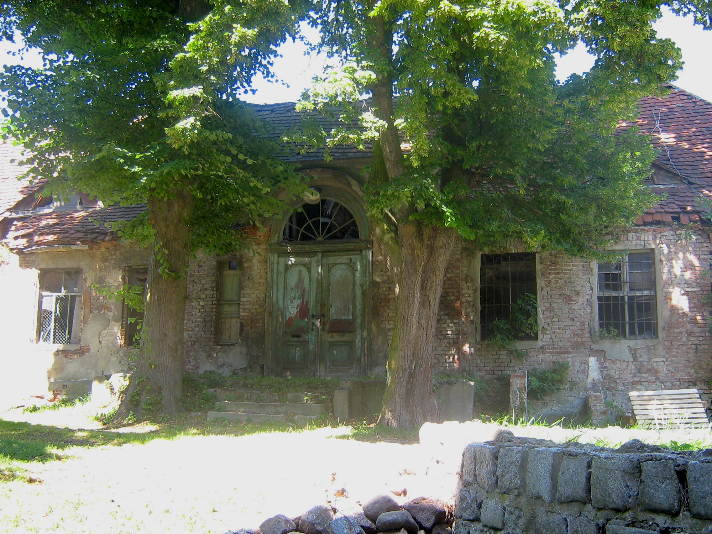 Zabytkowy dwór z XVII wieku w Wolinie